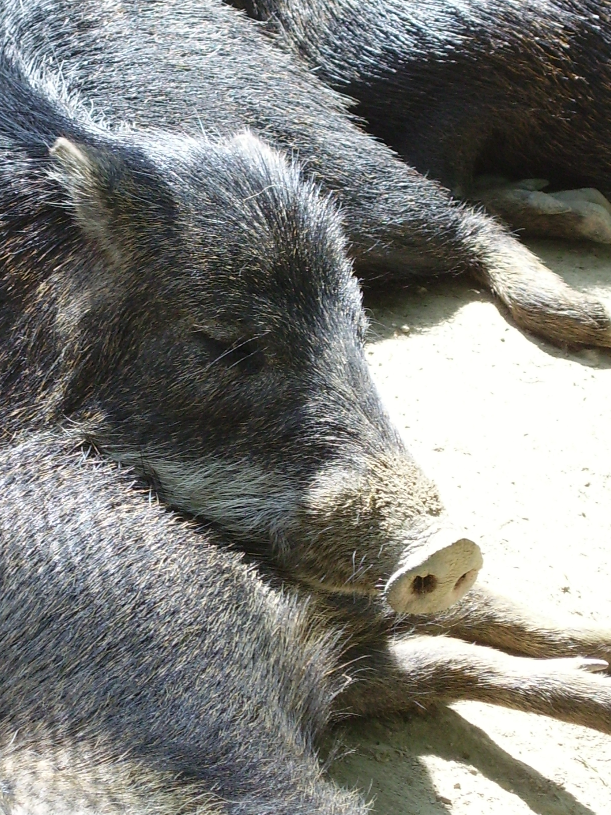 ZOO Brno; Pekari bělobradý (Tayassu pecari)